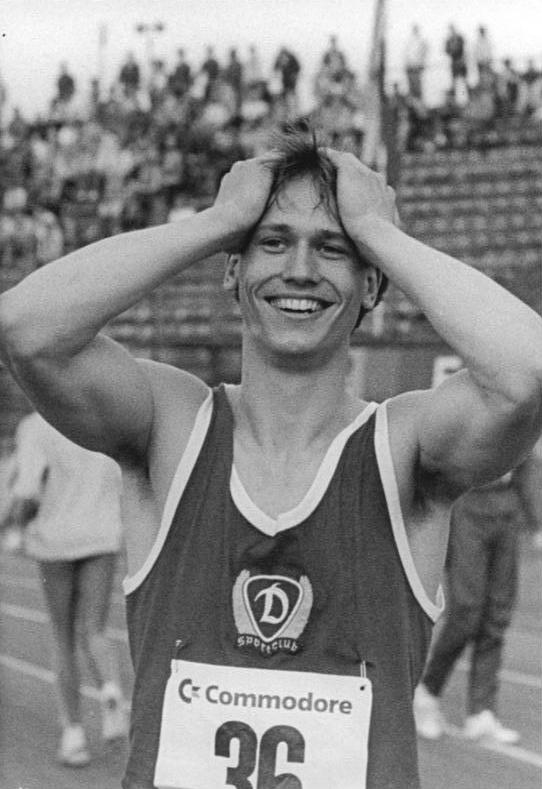 Sven Matthes ADN-ZB Kluge 26.6.88 Rostock: 39. DDR-Meisterschaften Leichtathletik - Neuer DDR-Meister über 100 Meter wurde am 25.6.1988 Sven Matthes (SC Dynamo Berlin) mit 10,19 Sekunden. Im Zwischenlauf hatte er mit 10,18 Sekunden einen neuen Junioren-Europarekord erzielt.